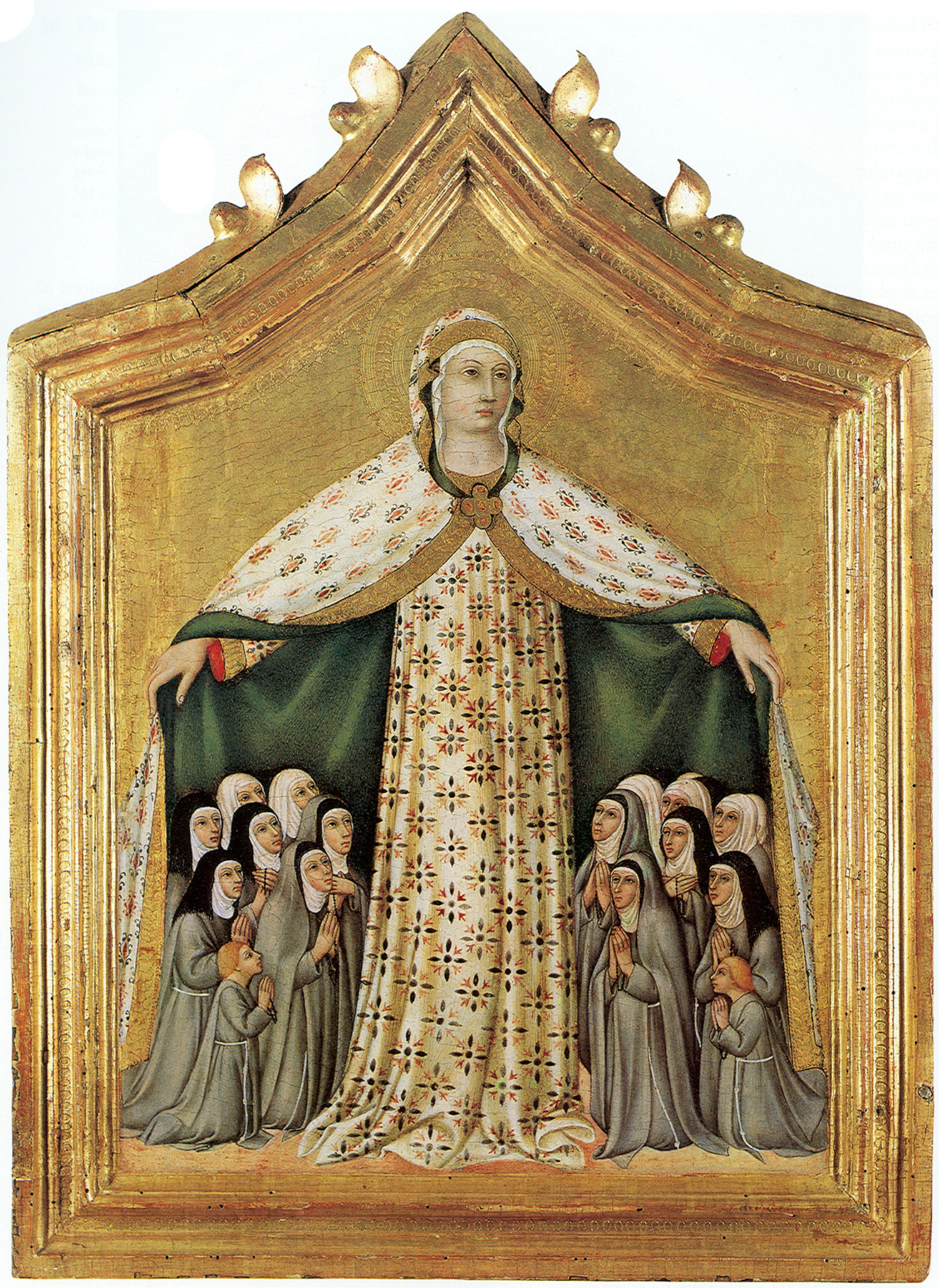 Madonna of Mercy